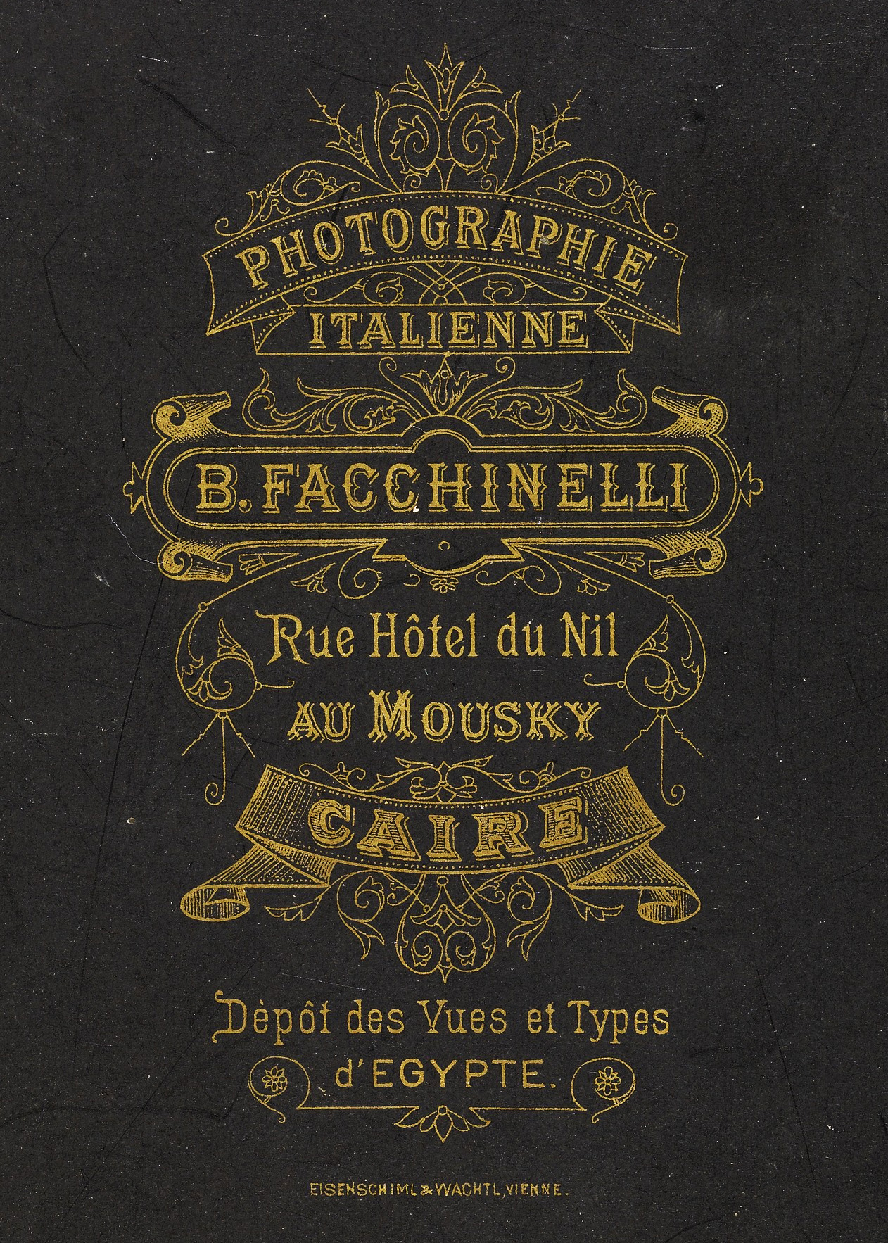 Cabinet card verso for Beniamino Facchinelli